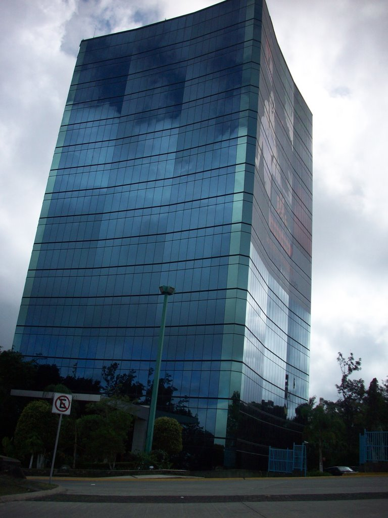 Vista de la torre animas desde su entrada principal.